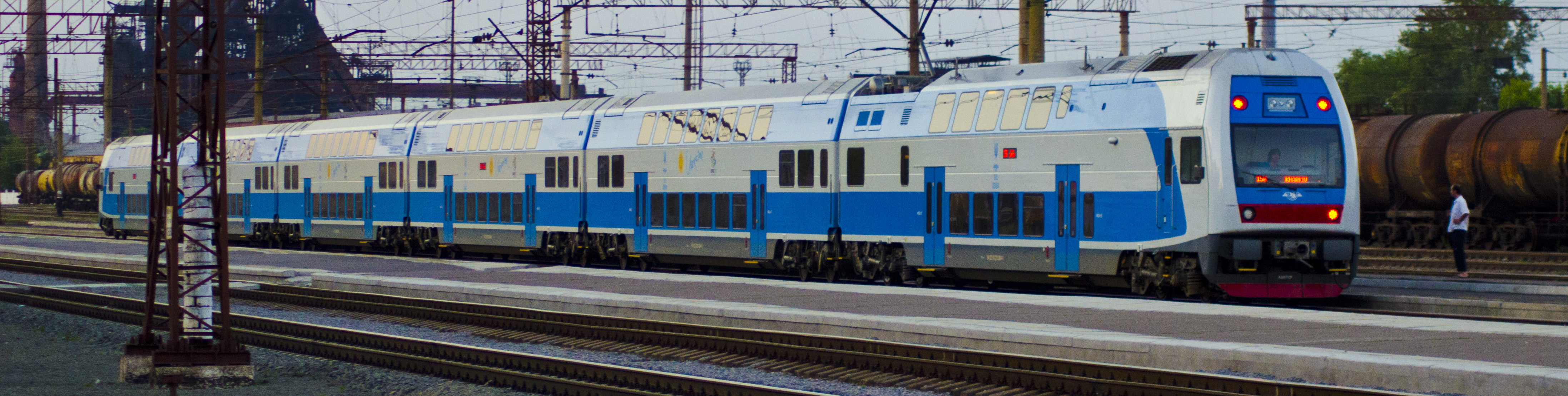 EJ 675 (Elektrická Jednotka, тип 675) — двухэтажный межрегиональный электропоезд двойного питания производства компании «Škoda Vagonka». Отправление со станции Краматорск, Донецкой Ж/Д.